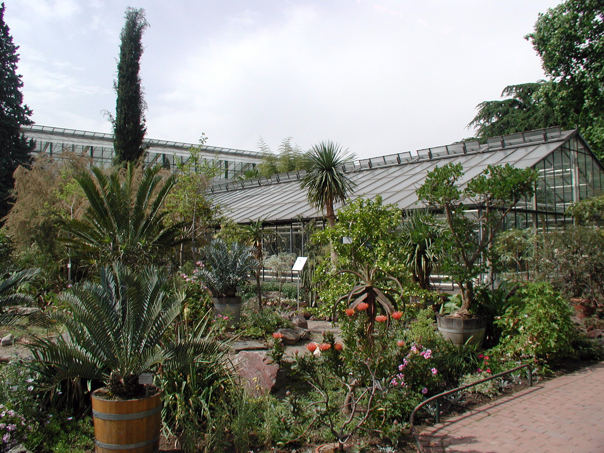 Flora Köln, Kakteenhaus mit dem 1983/84 vorgelagerten Mittelmeergarten